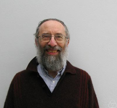 Foto di Richard Shore